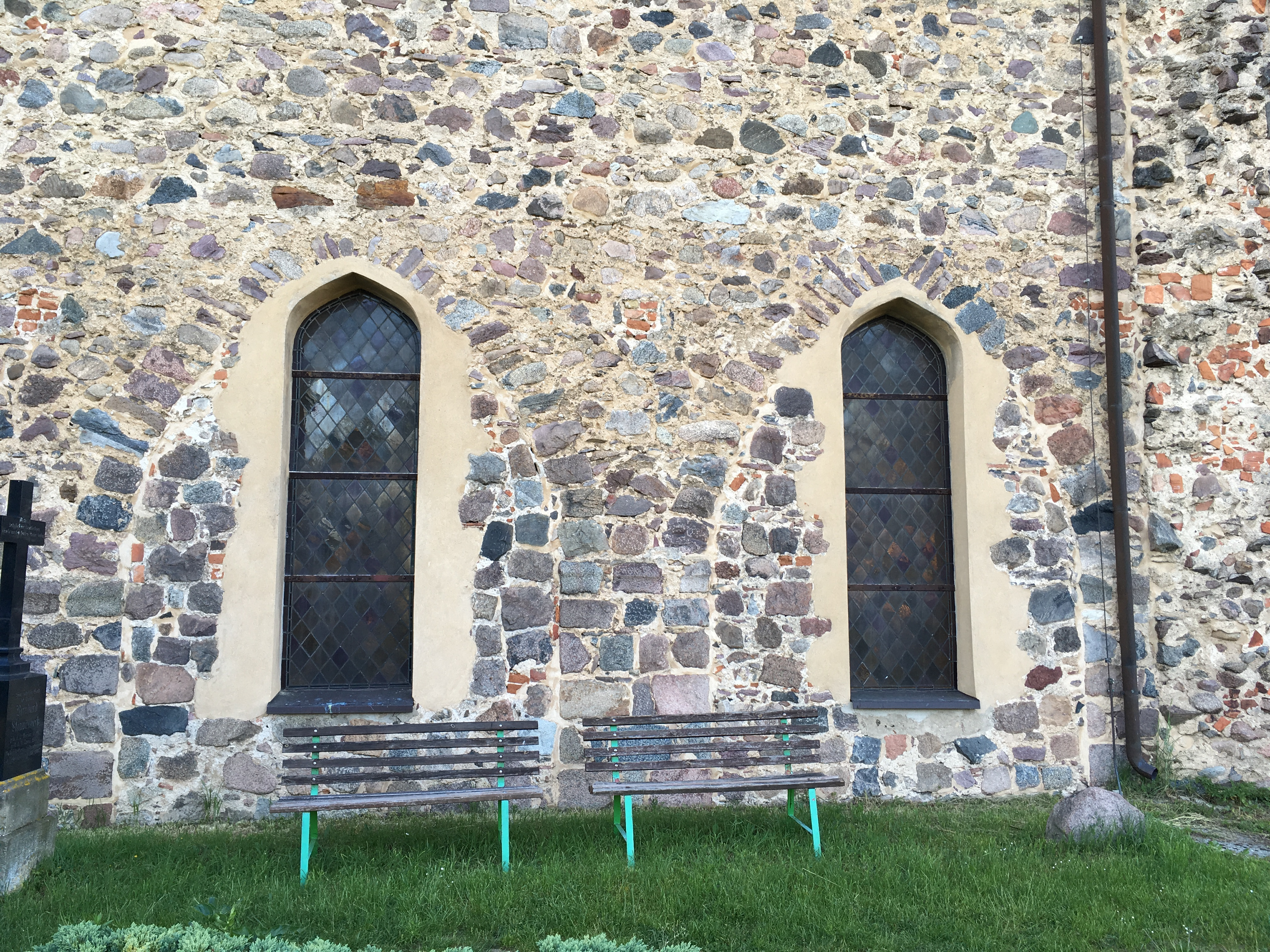 Die Dorfkirche Falkenhagen wurde in der ersten Hälfte des 14. Jahrhunderts als Basilika mit einem dreischiffigen Langhaus errichtet. 1801 trugen Handwerker die Seitenschiffe ab und schlossen die Arkadenbögen. Zur Ausstattung gehören unter anderem eine Kanzel aus dem Anfang des 18. Jahrhunderts sowie eine hölzerne Fünte aus der ersten Hälfte des 17. Jahrhunderts.